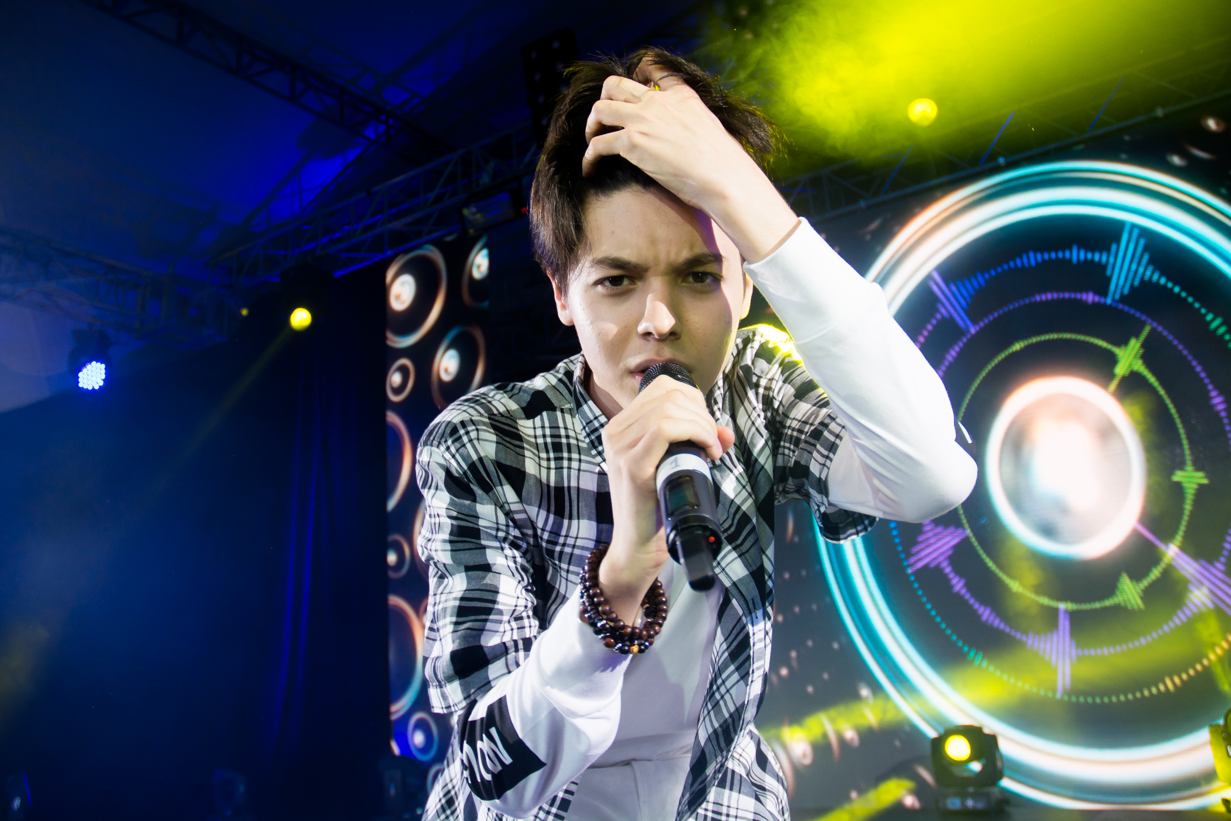 Выступление Кристиана Костова на слёте «Битва Талантов» в Сочи 5 мая 2016 года